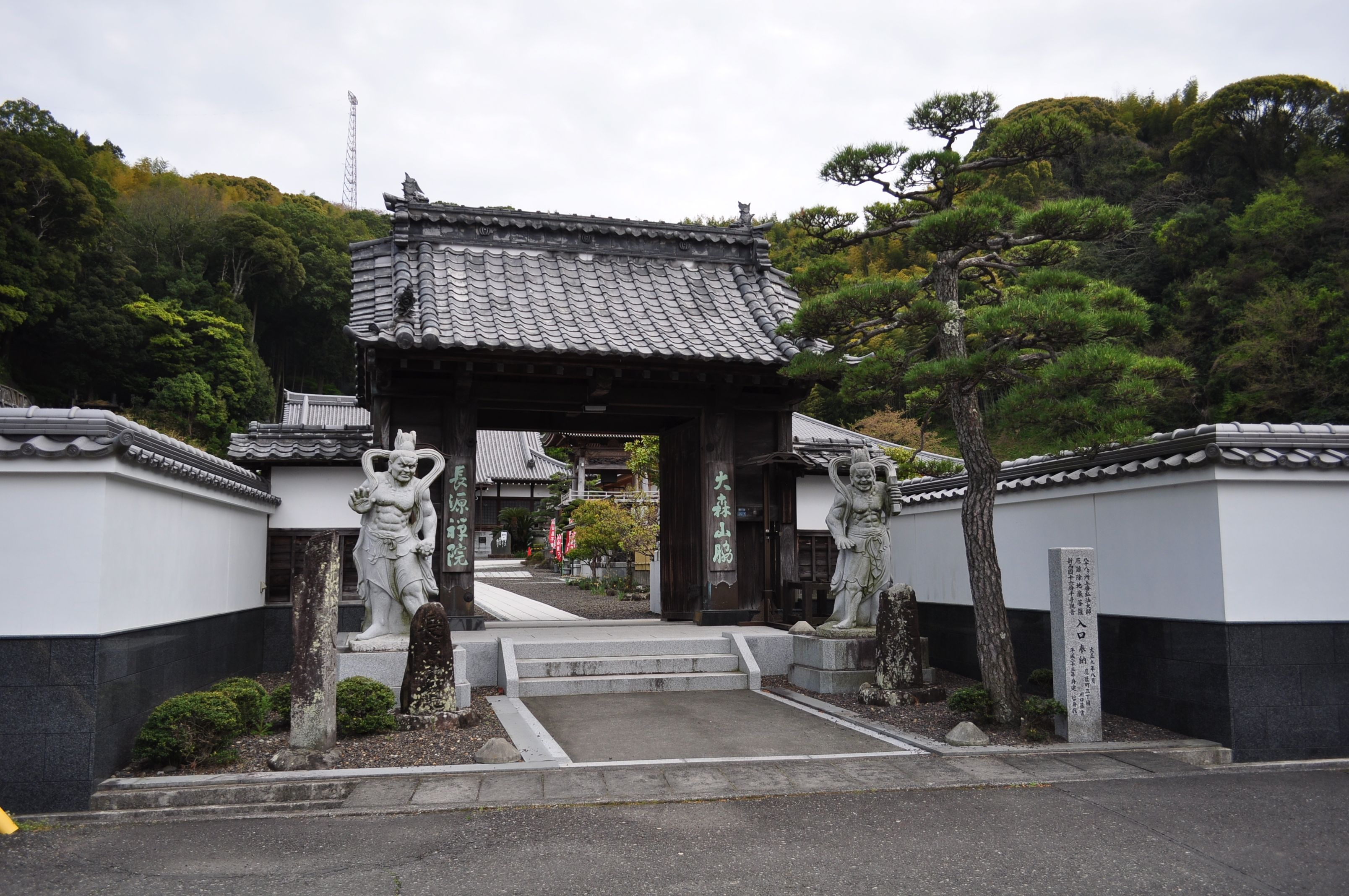 長源院 山門